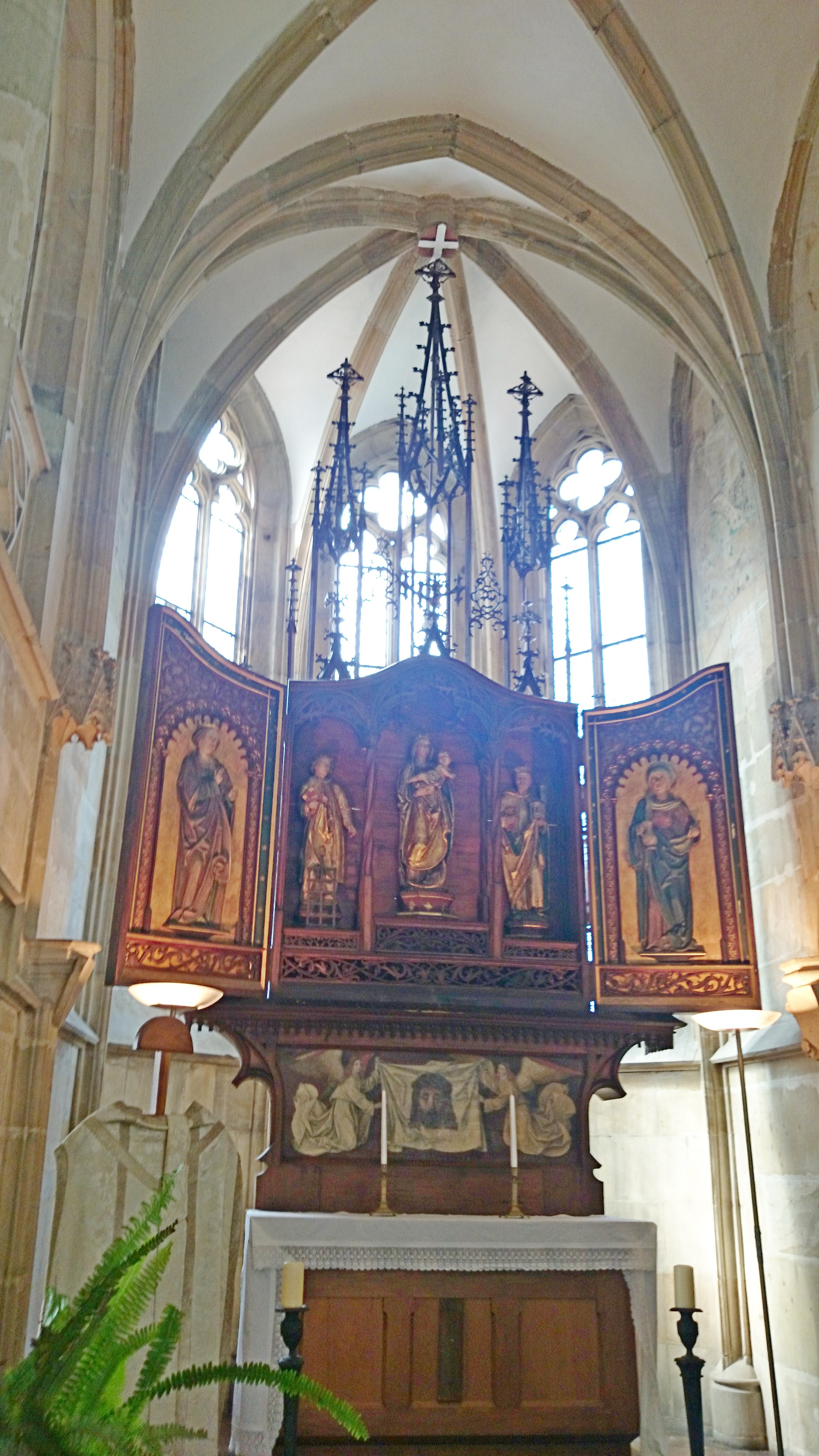 Klenby nad oltářem